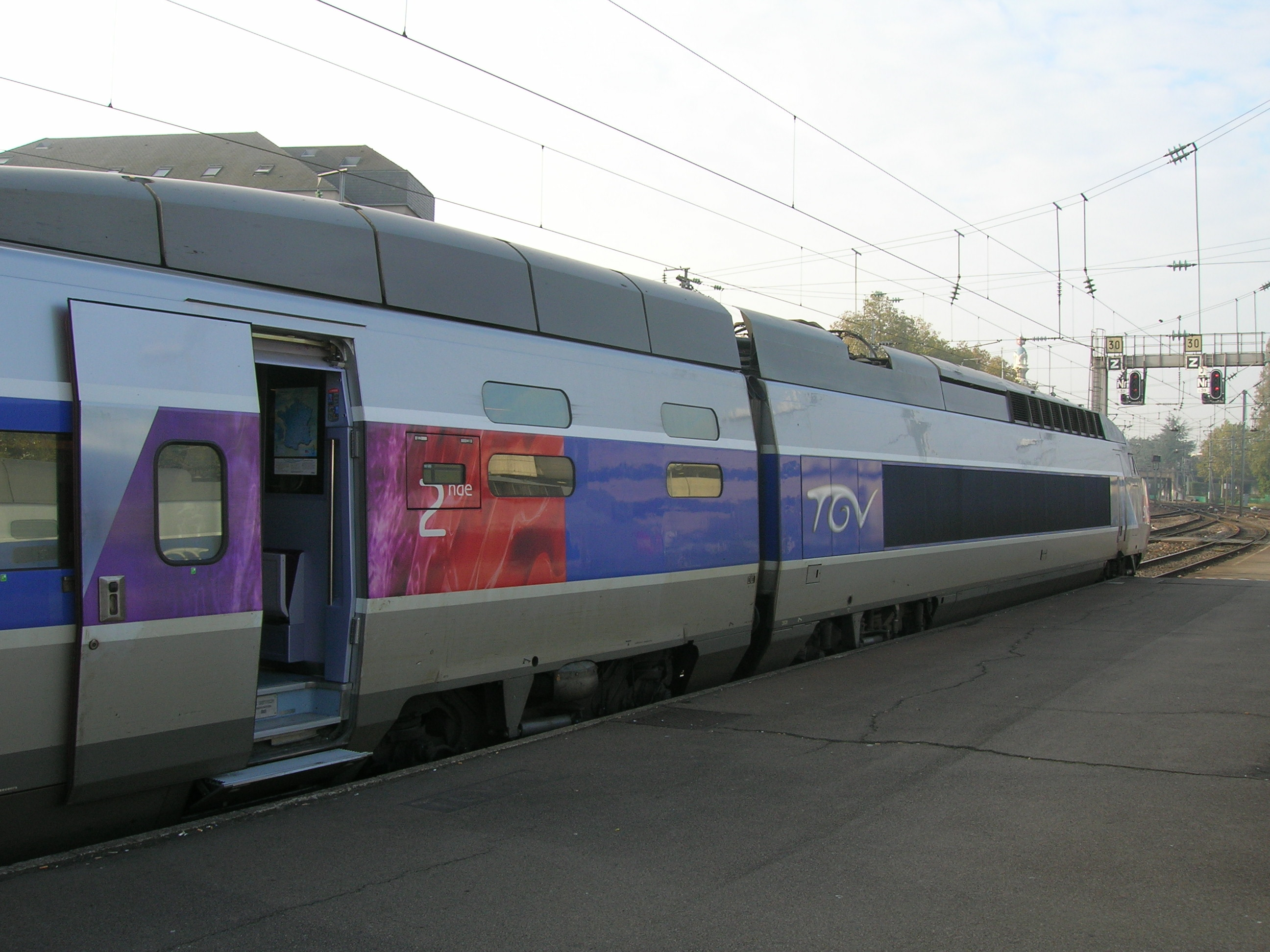 TGV Réseau Lacroix à Nantes, France